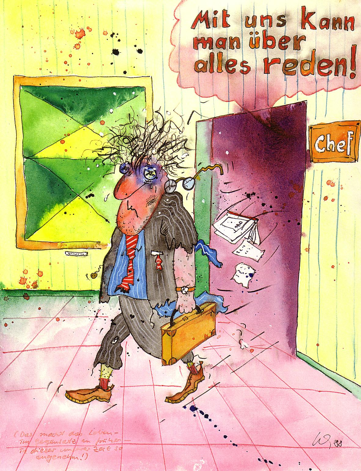 Cartoon